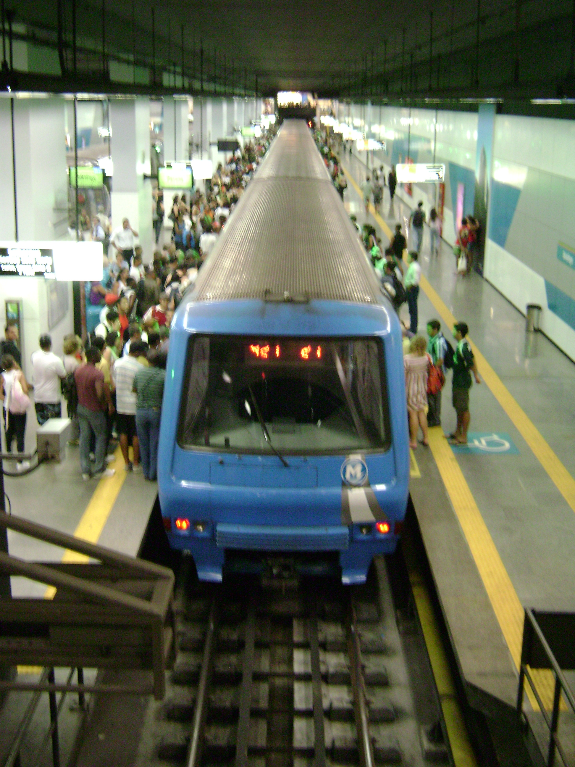 Metrô na estação Botafogo da cidade do Rio de Janeiro, Brasil.